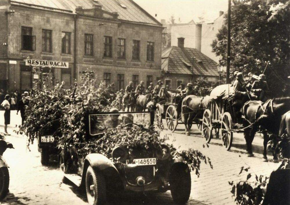 Wkroczenie wojsk niemieckich (oddziały 45 Austriackiej Dywizji Piechoty) w dniu 3 września 1939 r. Na zdjęciu ul. Cieszyńska koło skrzyżowania z ul. Lompy, w głębi kamienica nr 25.